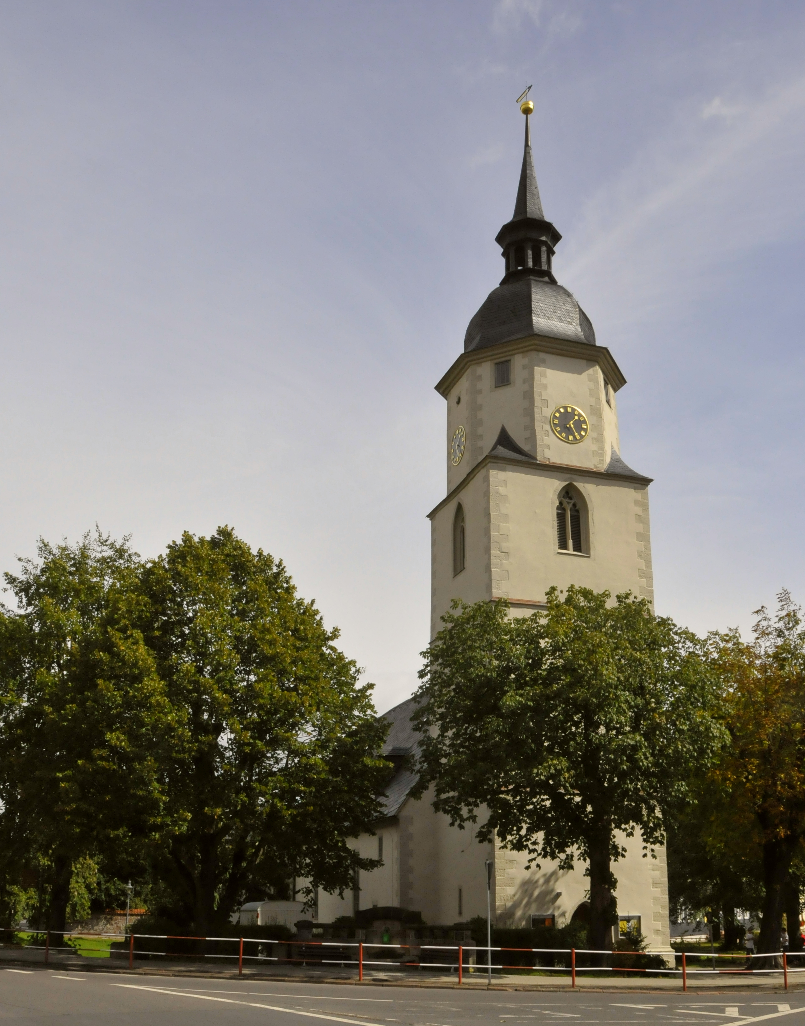 Friedrichroda, Blasiuskirche